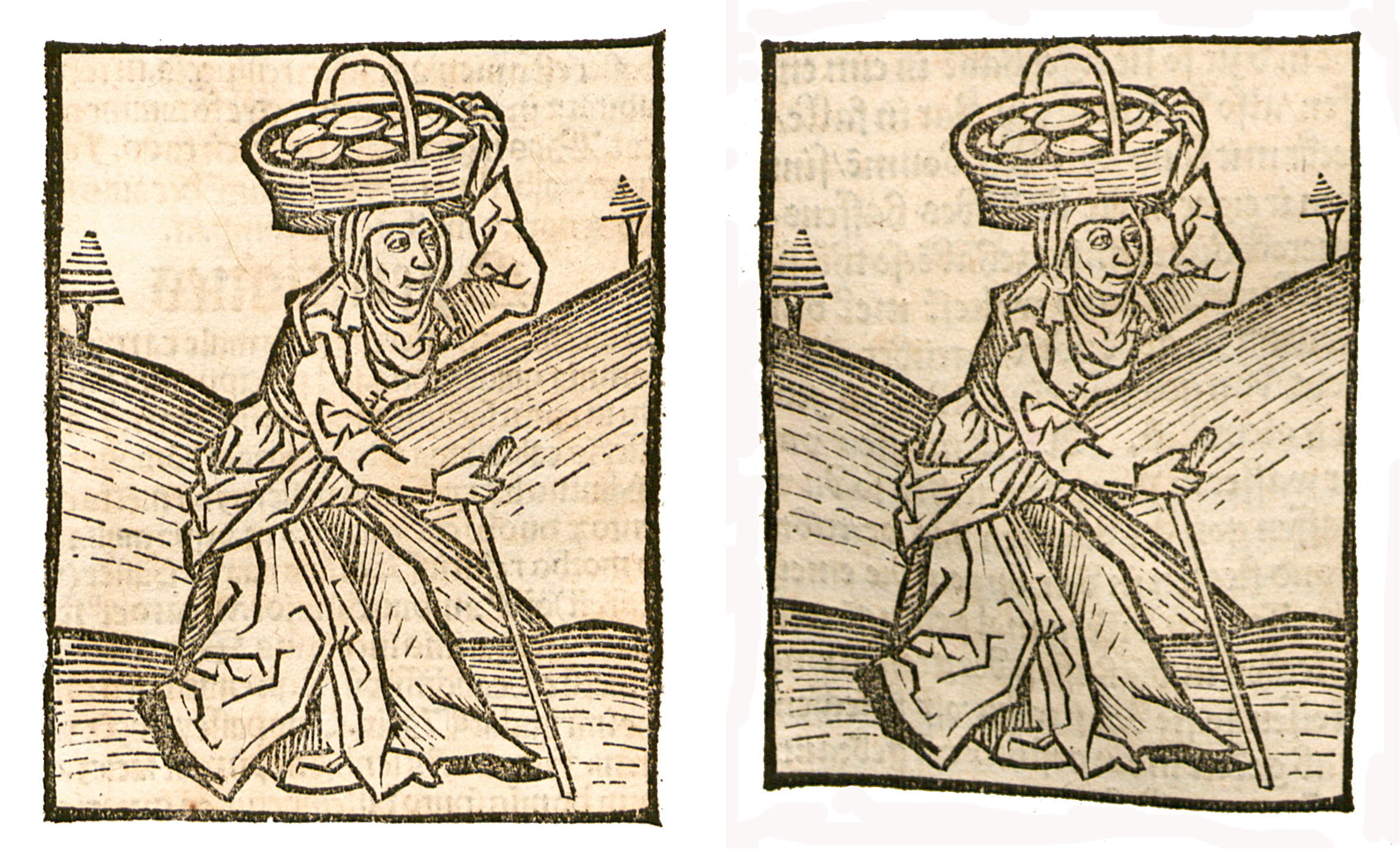 Abbildung von: Eiweiss